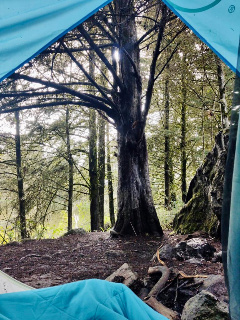 Fotografía de camping en la laguna de Busa.